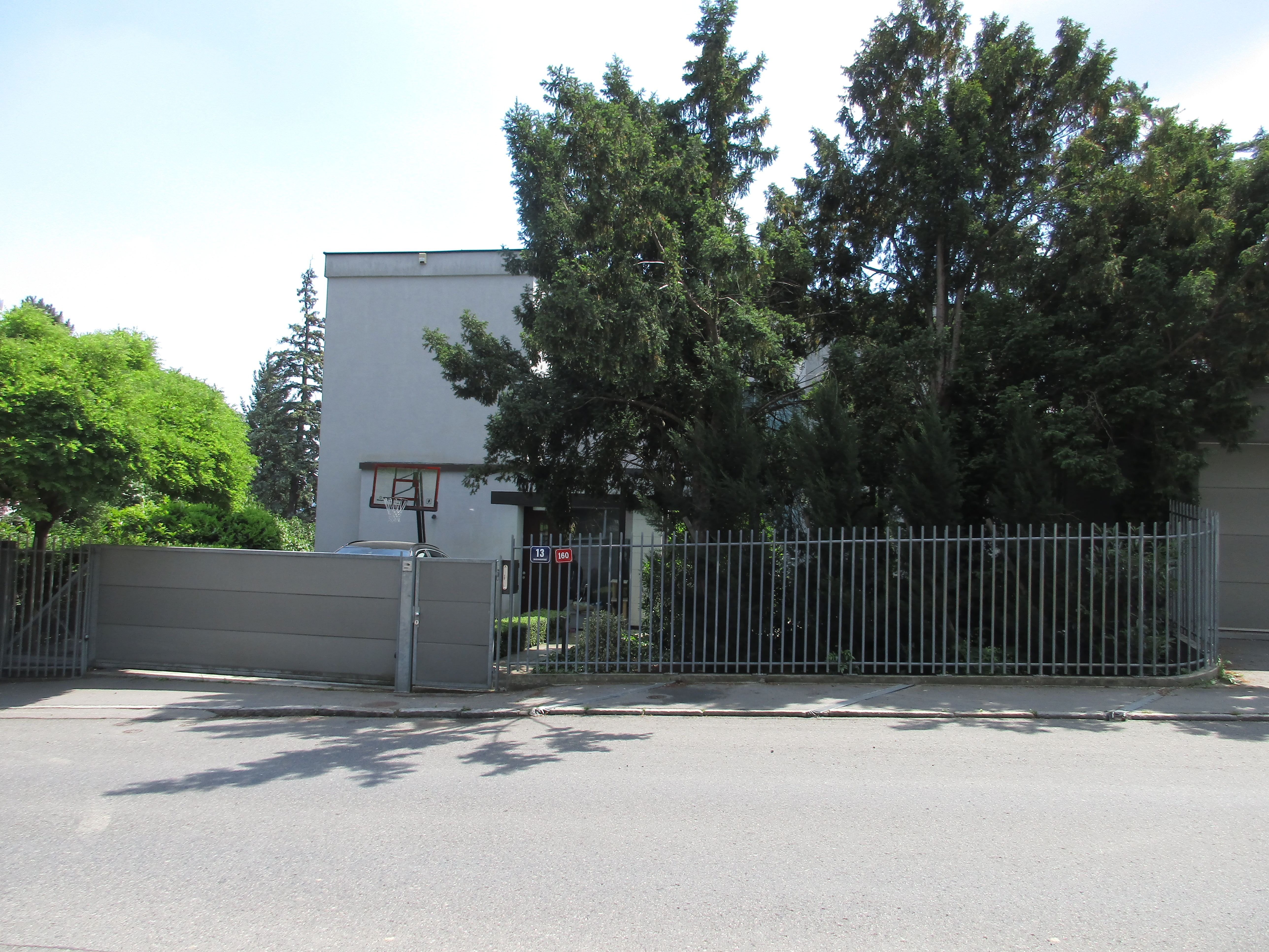 Barrandovská 160/13, Praha 5-Hlubočepy